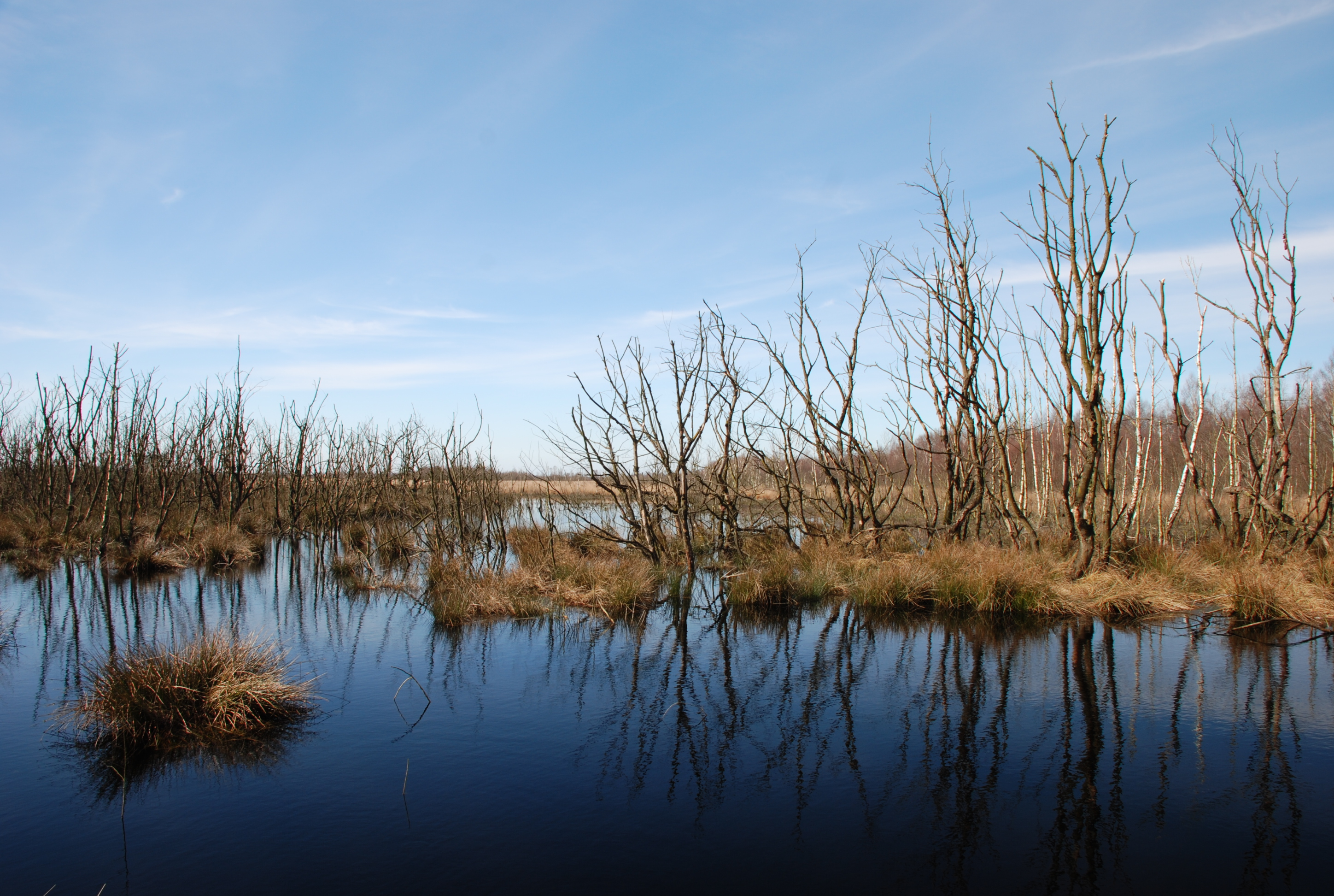 Ein kalter Wintermorgen im NSG Wesuweer Moor